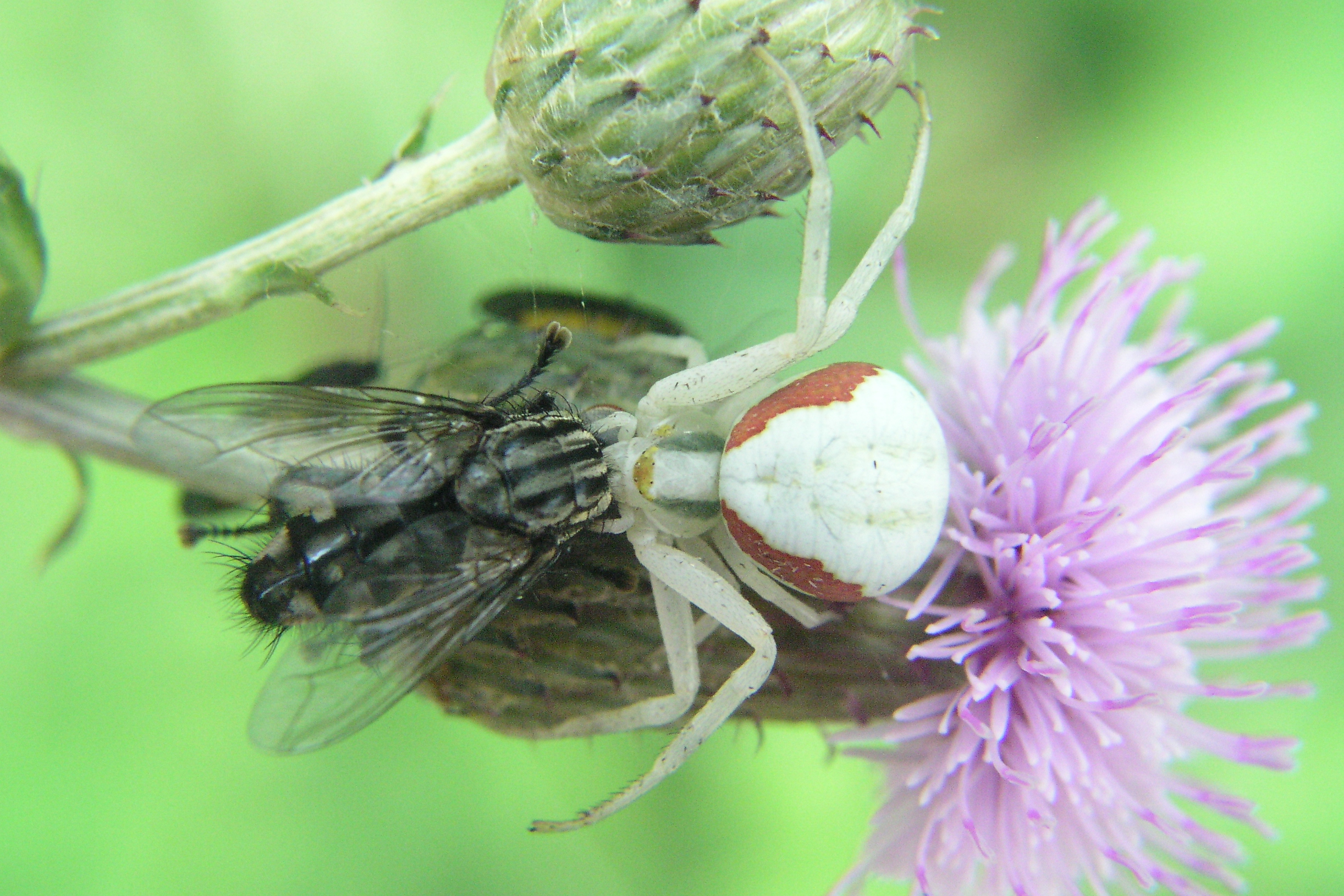 Description: Misumena vatia